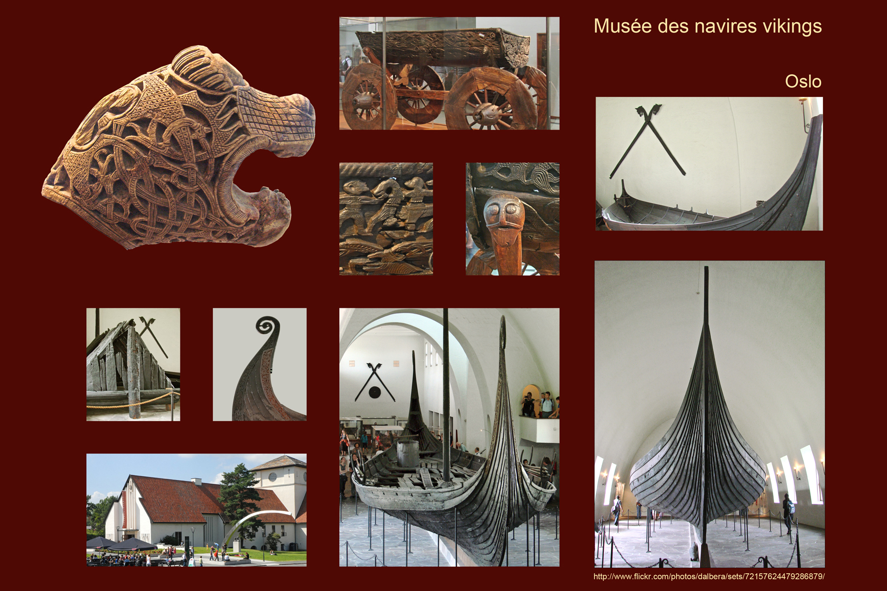 Page d'accueil du sous-album sur le musée des navires vikings d'Oslo